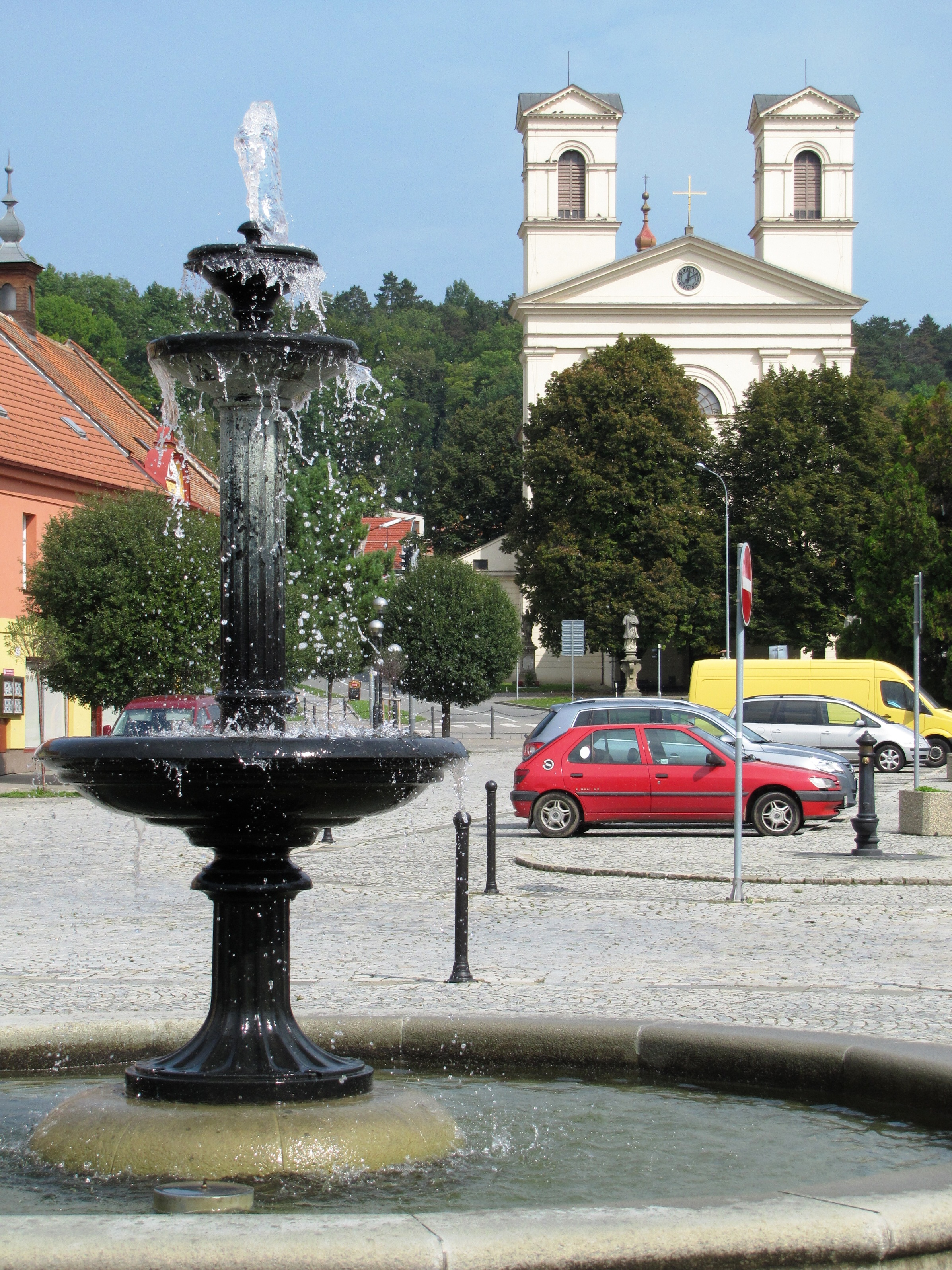 Kašna a kostel Nanebevzetí Panny Marie na náměstí v Bučovicích